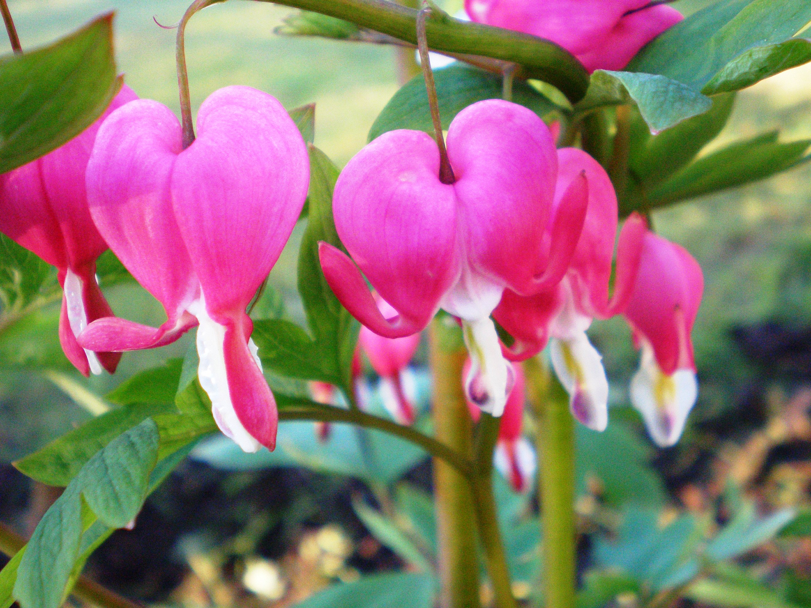 Dicentra spectabilis